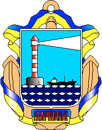 Герб Ильичёвска